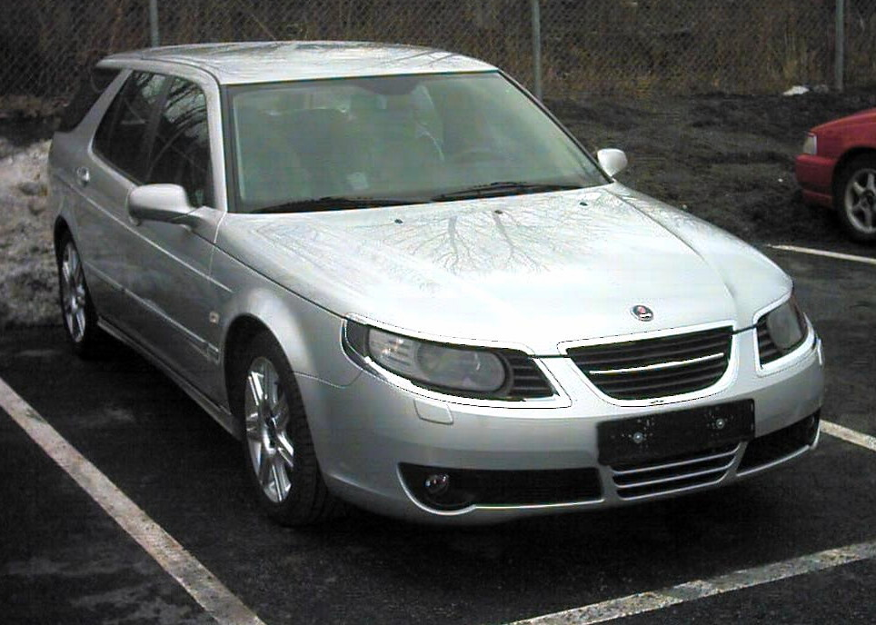 Saab 9-5 SportCombi photographed at Holmgrens in Jönköping 1 april 2006.